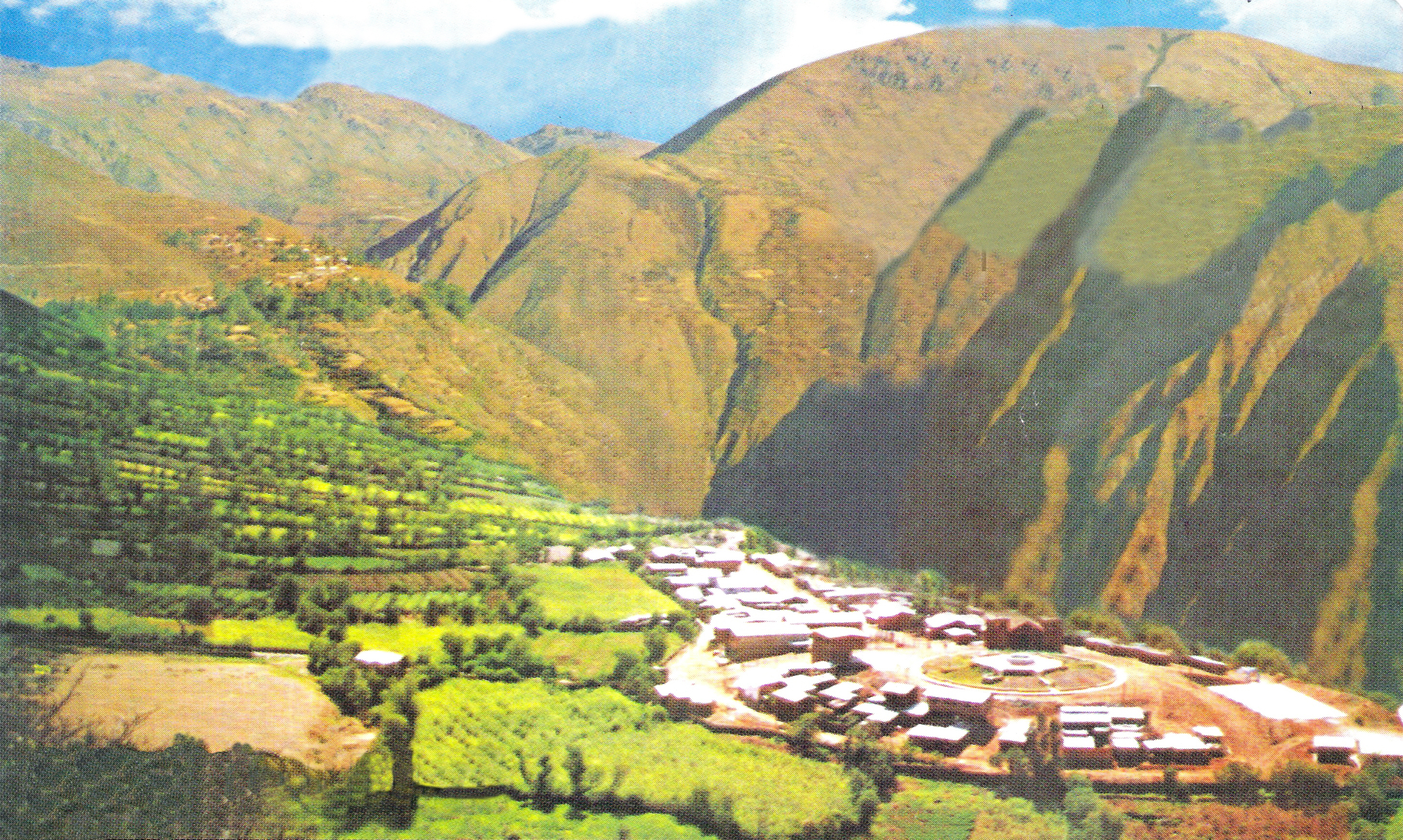 Llipa en el valle del rio Chinchis.